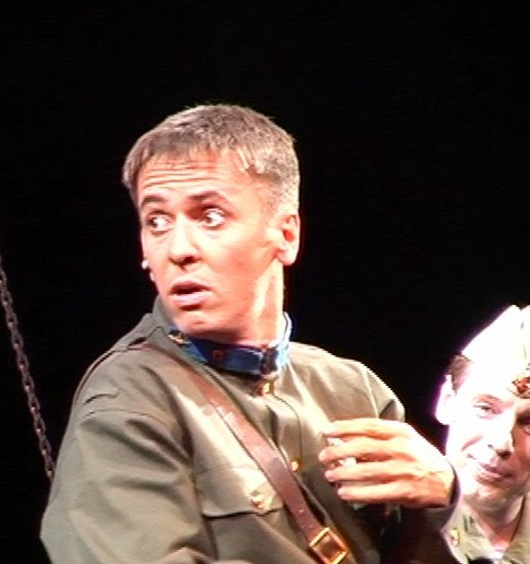 Стрелок в мюзикле "Норд Ост"